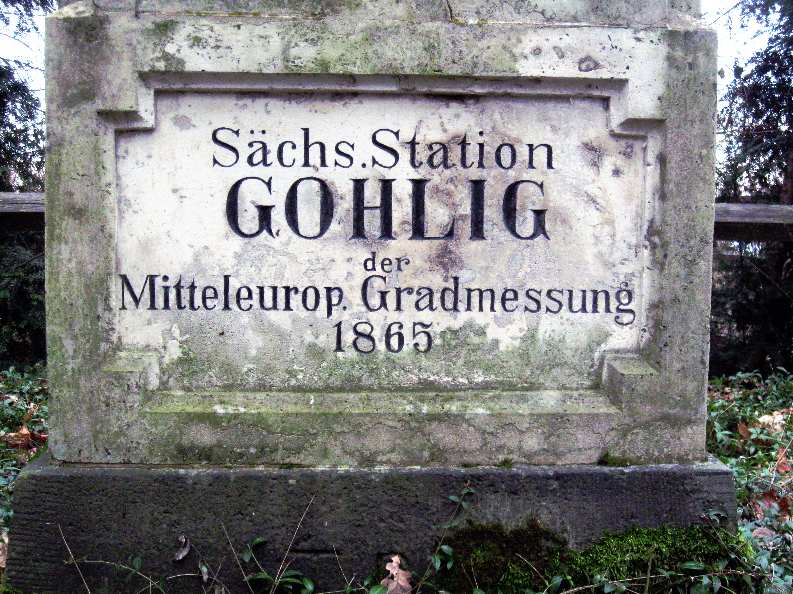 Gohlig Erhebung 350m Rippien Bannewitz Dresden Triangulationspunkt Triangulationssäule "Sächs. Station Gohlig der Mitteleurop. Gradmessung 1865" Netz